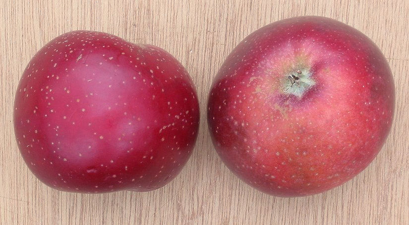 zelfgemaakte foto van de Sterappel; begin december